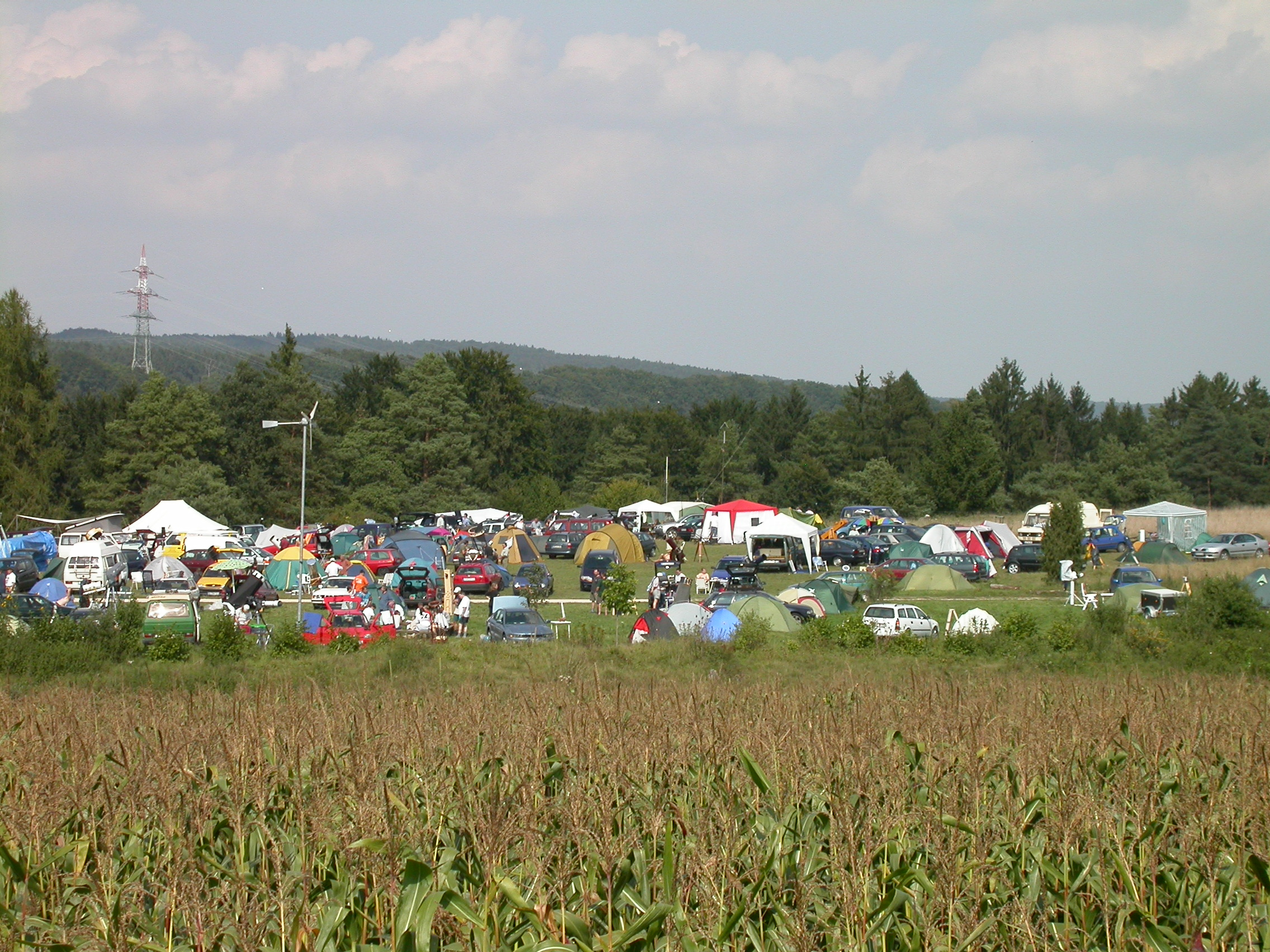 Panoramaaufnahme des Bayerischen Teleskopmeetings 2002